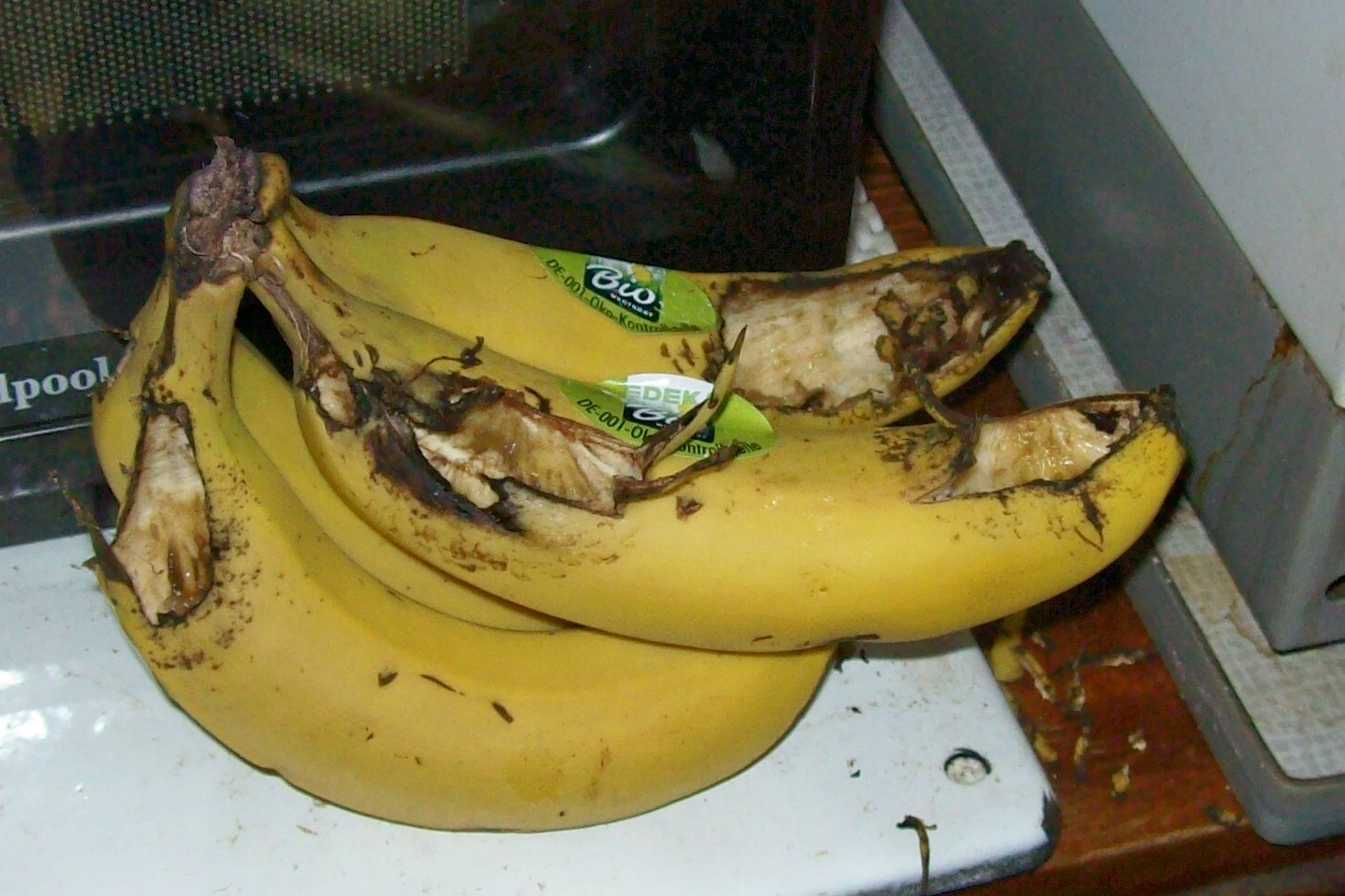 angefressene Bananen